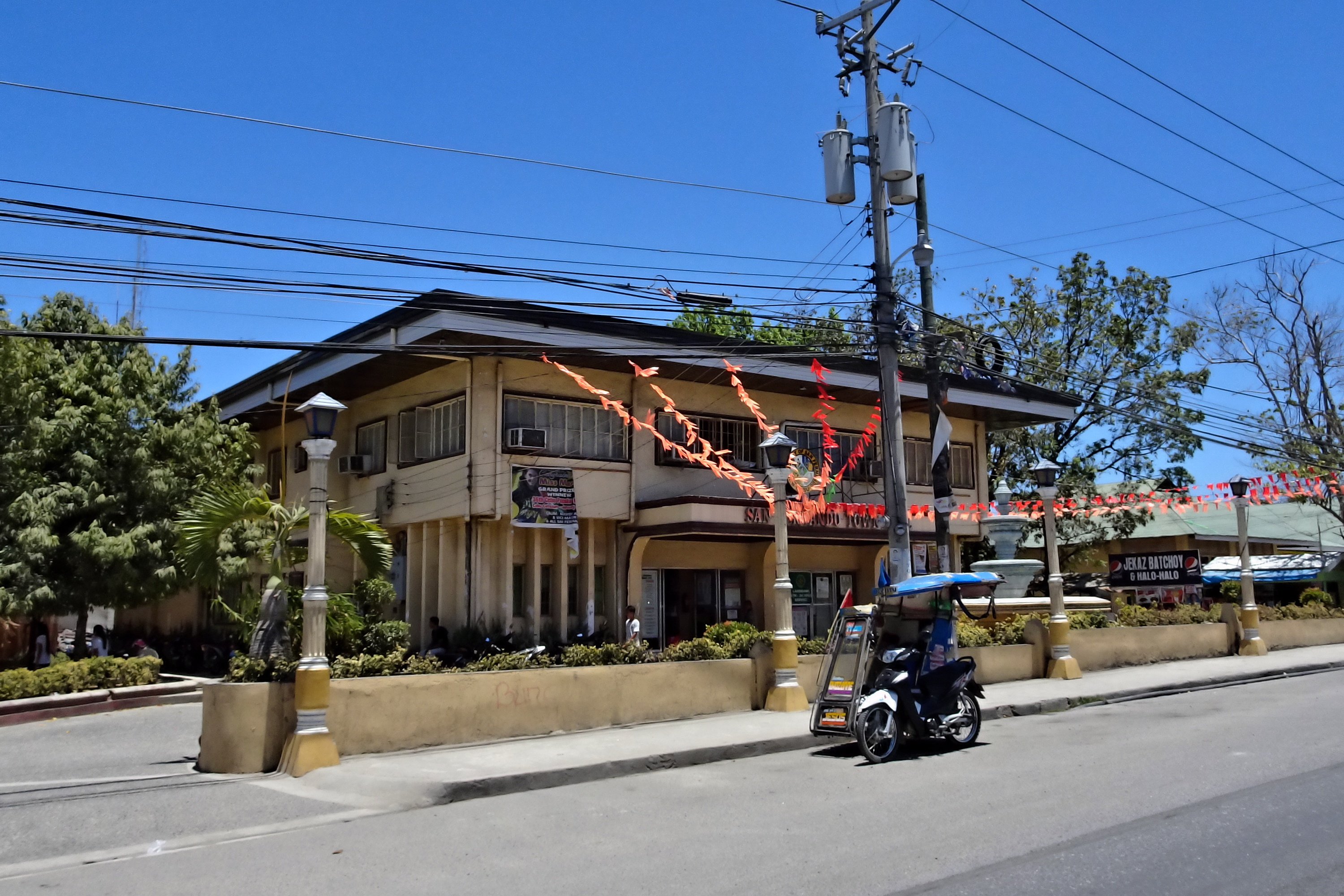 San Fernando, Cebu, Philippines